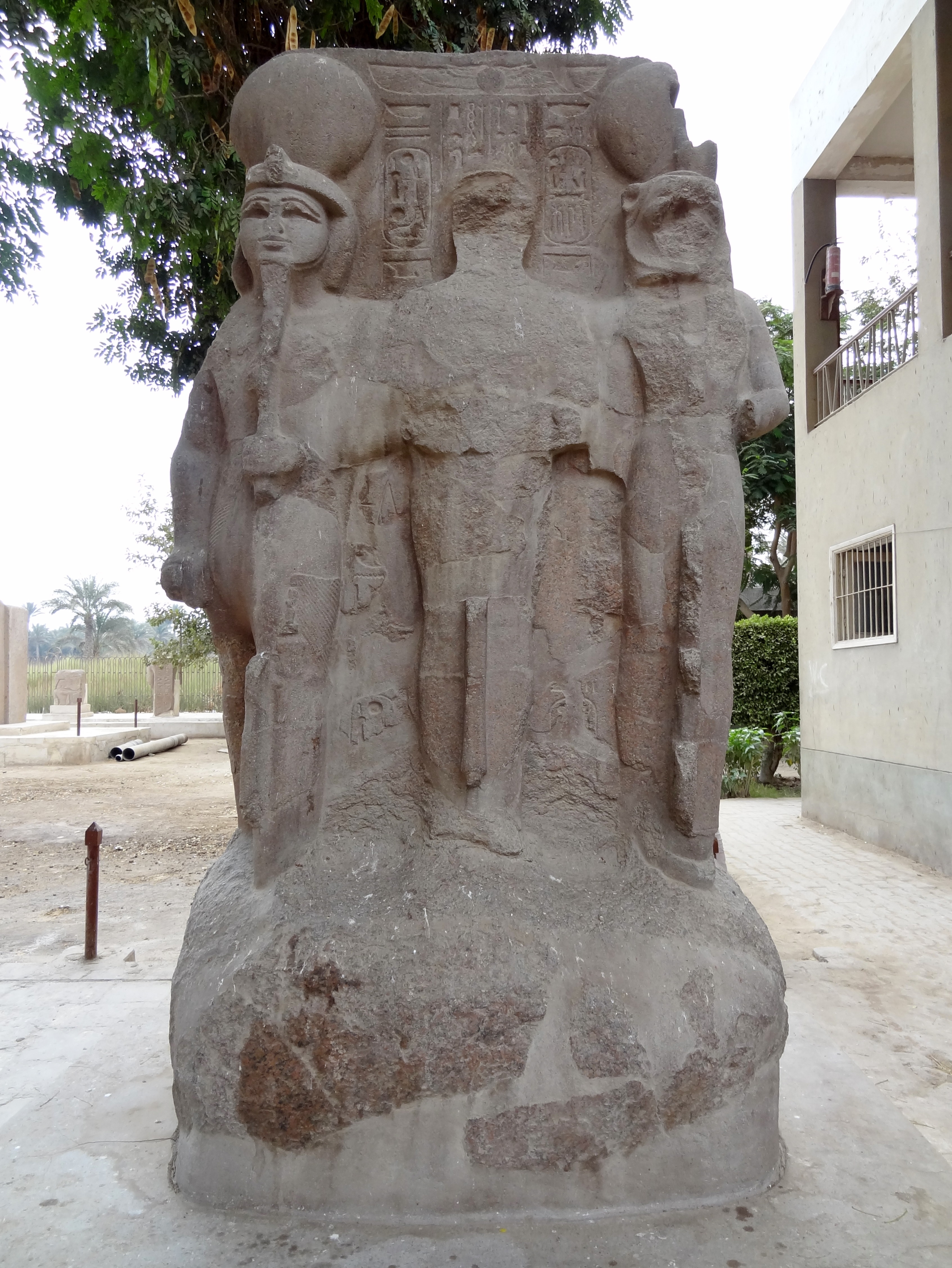 Triade von Memphis: Ptah, Sechmet und Nefertum, auf dem Museumsgelände von Memphis, Ägypten